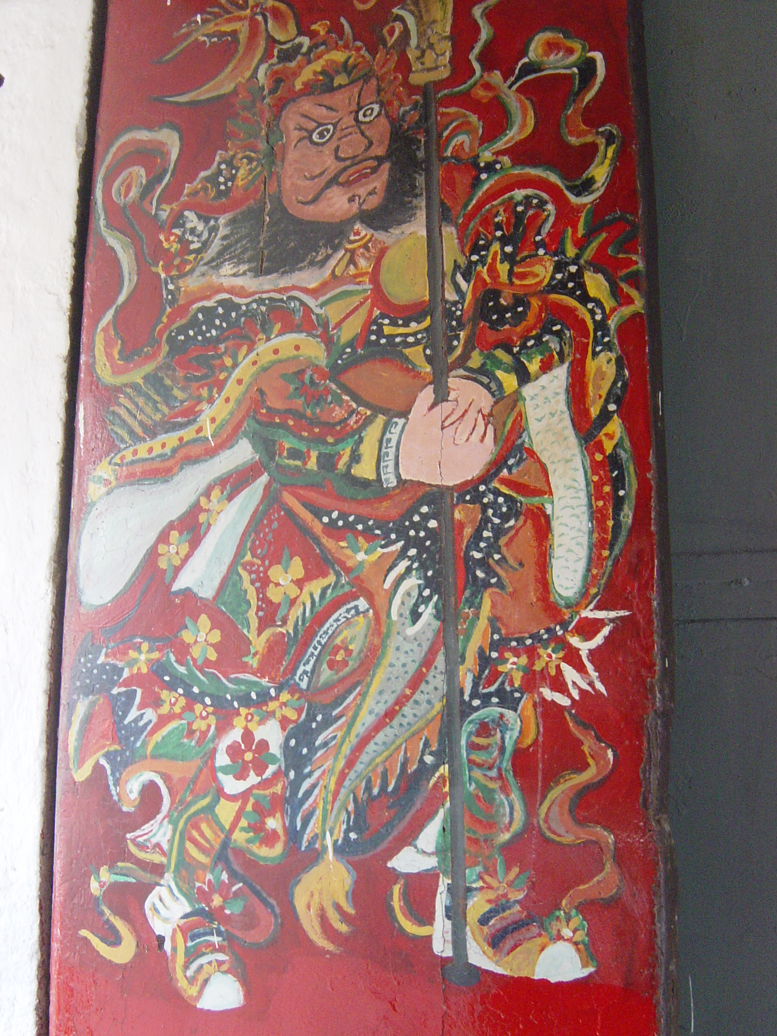 香港一天后古廟門上的左門神。Door God in Hong Kong.